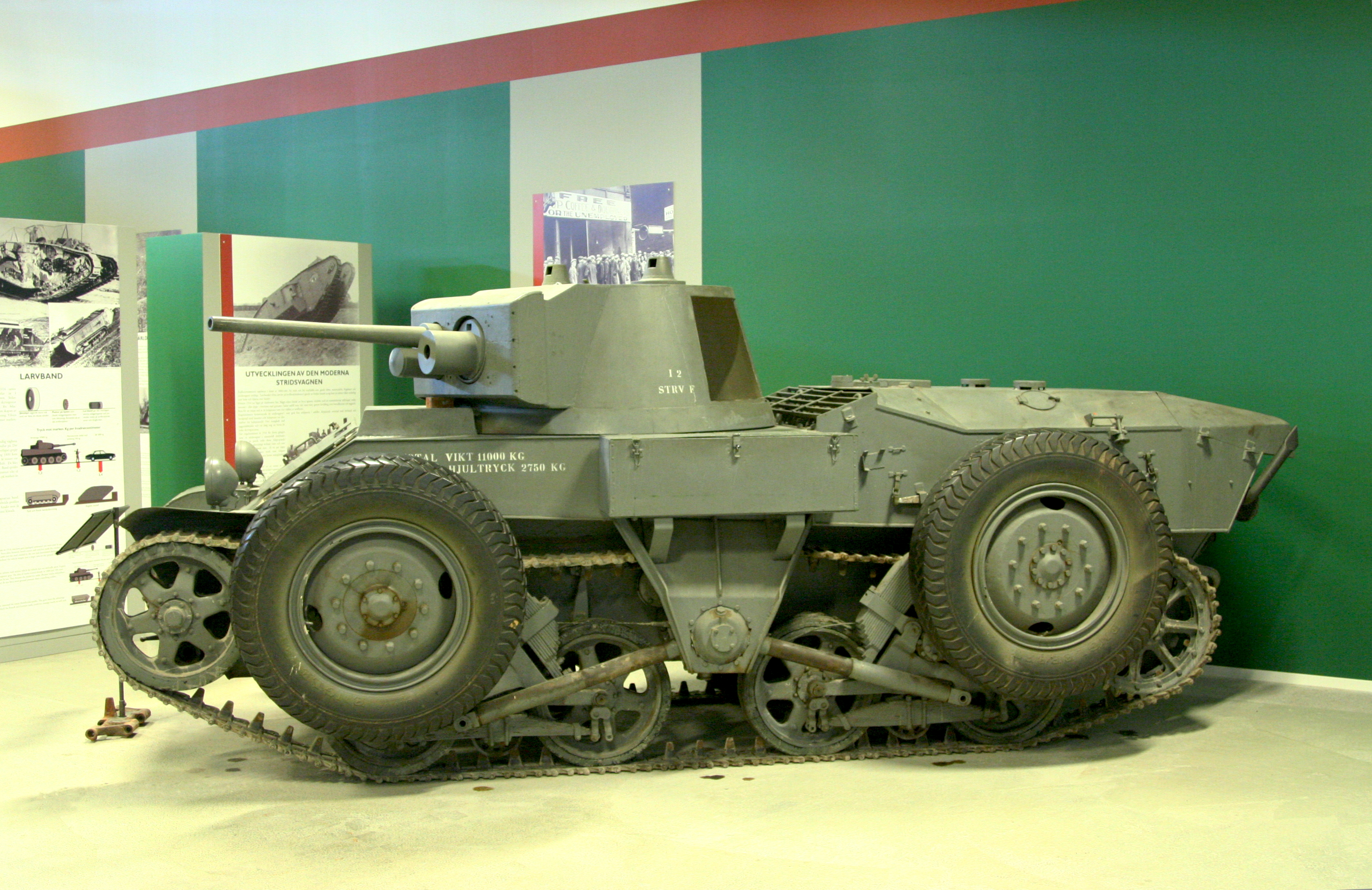 Leichter Panzer Landsverk L-30 (Stridsvagn fm/31) im Sveriges Försvarsfordonsmuseum - Arsenalen - in Strängnäs am 12.August 2011